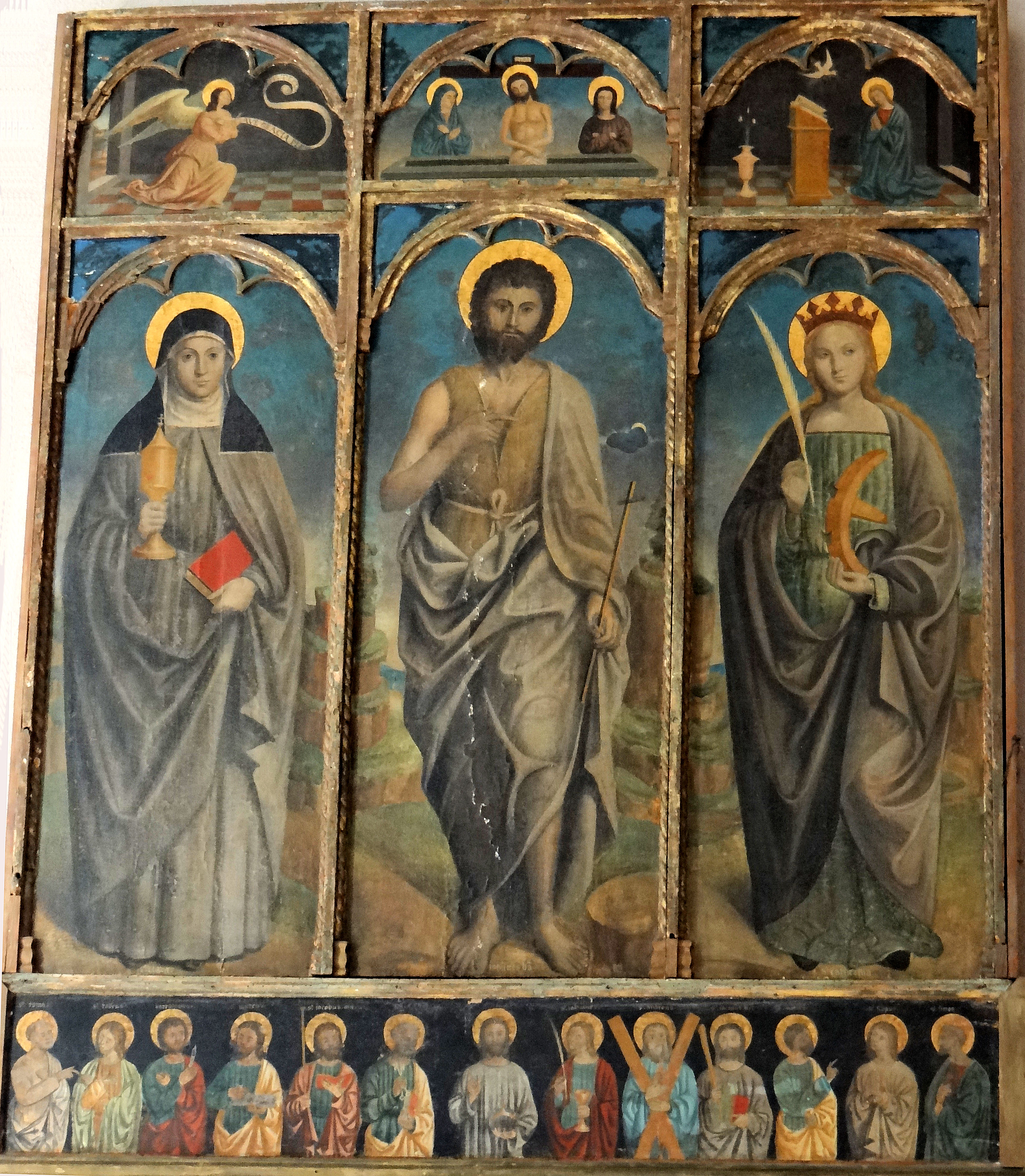 Bonson - Église Saint-Benoît - Retable de saint Jean-Baptiste d'Antoine Bréa